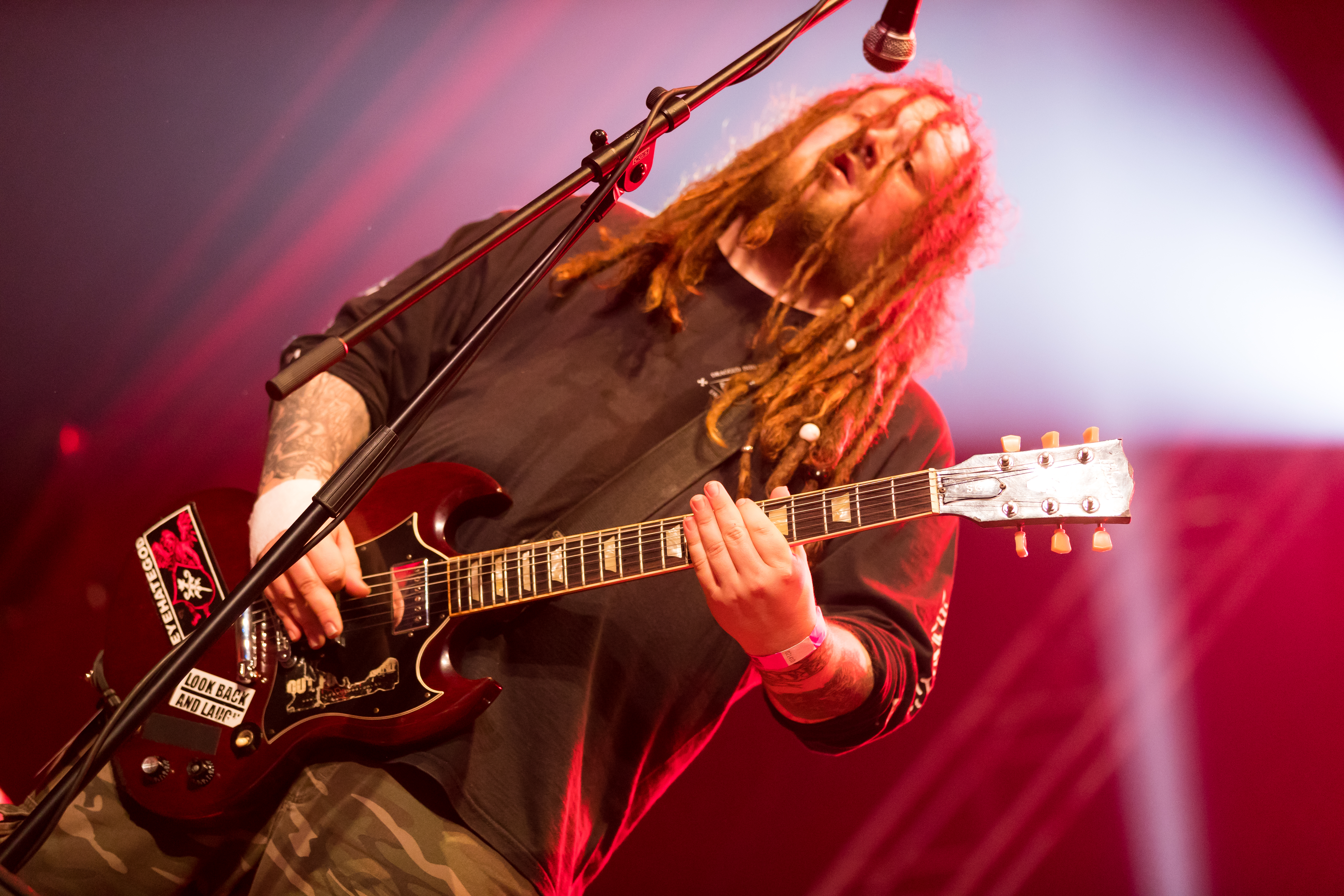 Napalm Death during Wacken Open Air at Schleswig-Holstein, Wacken, , Germany on 2017-08-03, Photo: Sven Mandel